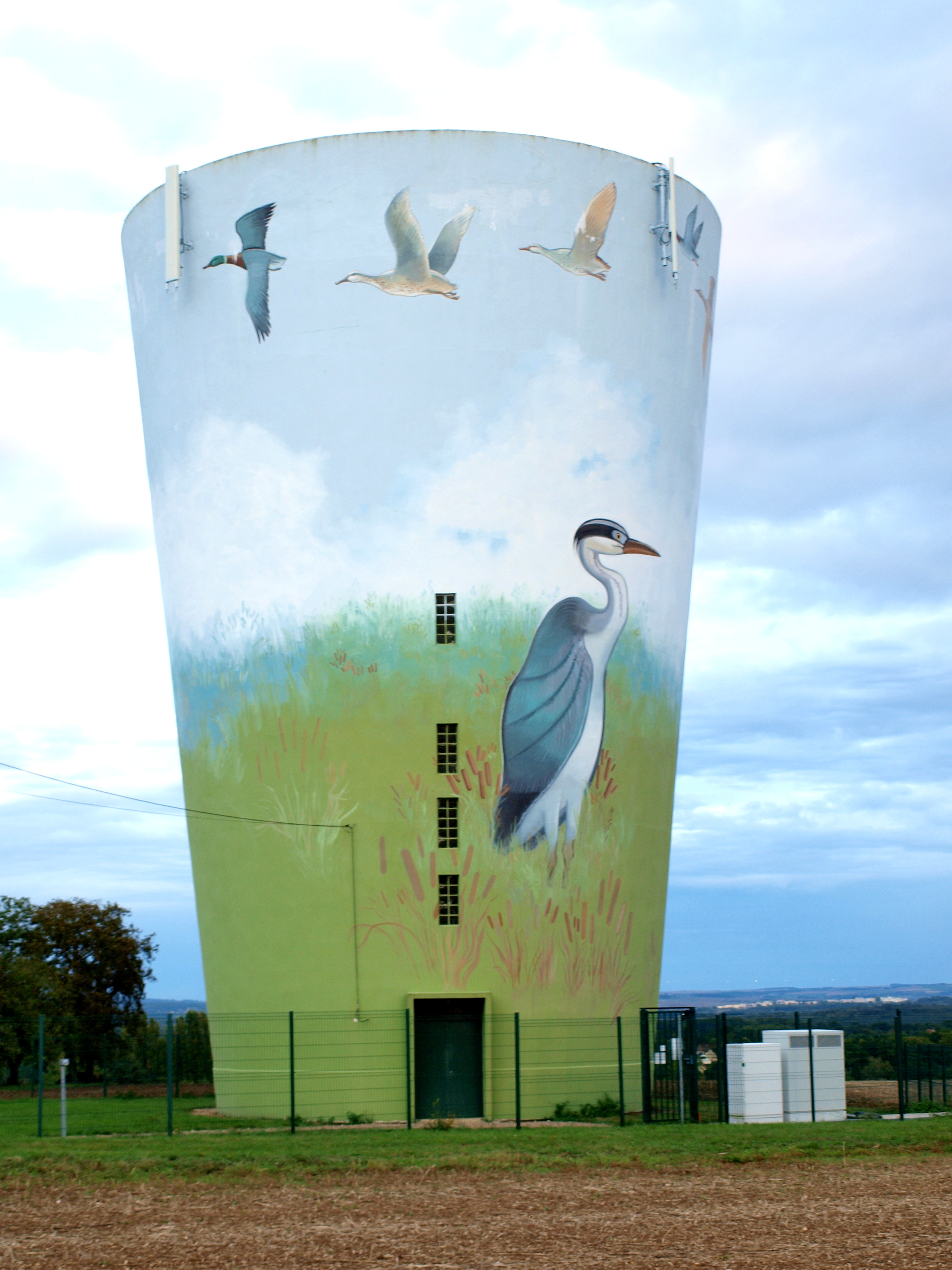 Charbuy (Yonne, France) ; château d'eau